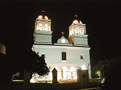 El Templo Colonial mas antiguo del Uruguay